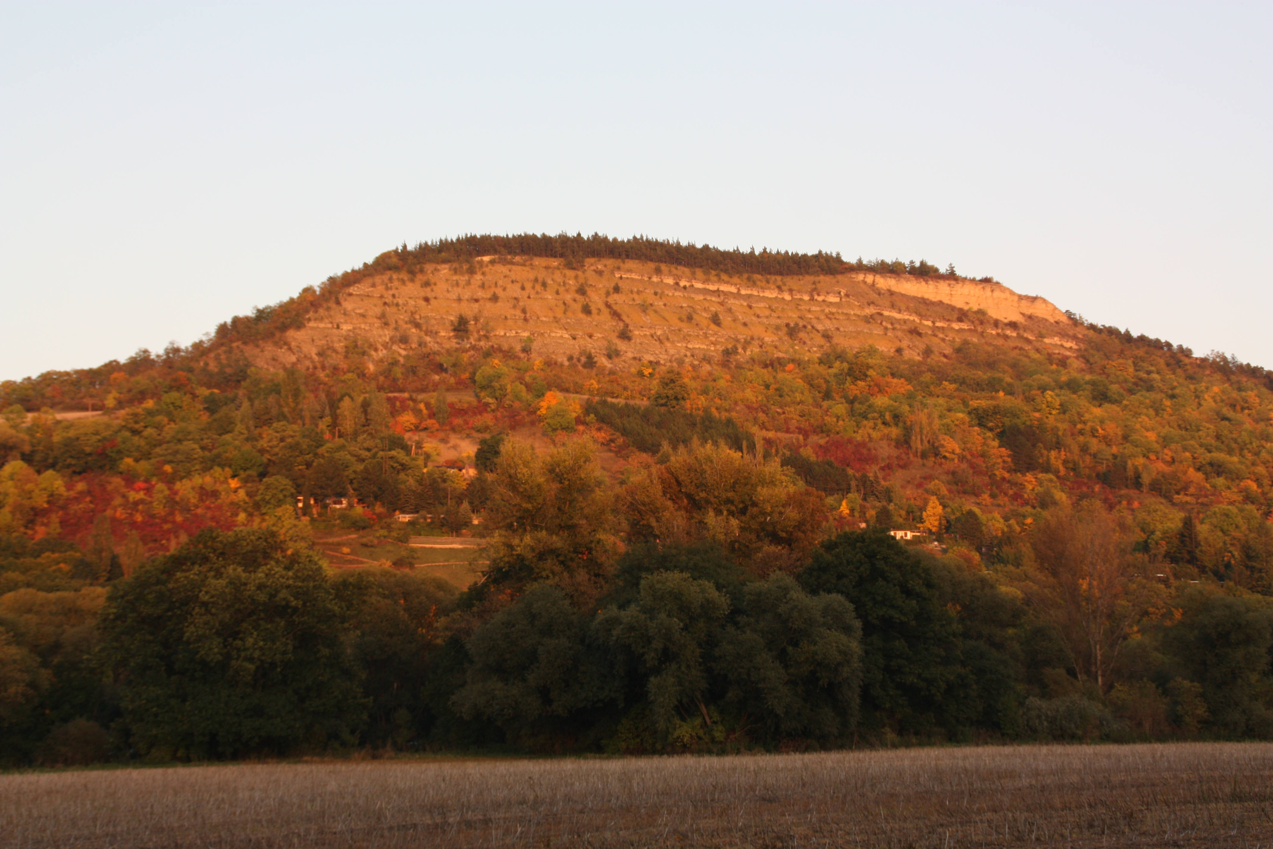 Jena-Lobeda, Johannisberg. Blick von Burgau aus (von Westen).